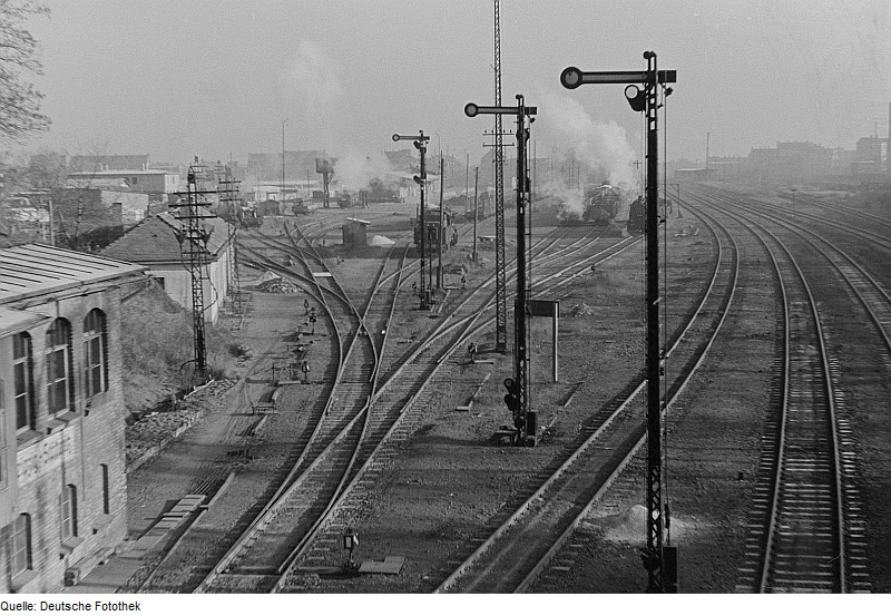 Original image description from the Deutsche Fotothek Güterbahnhof Stötteritz